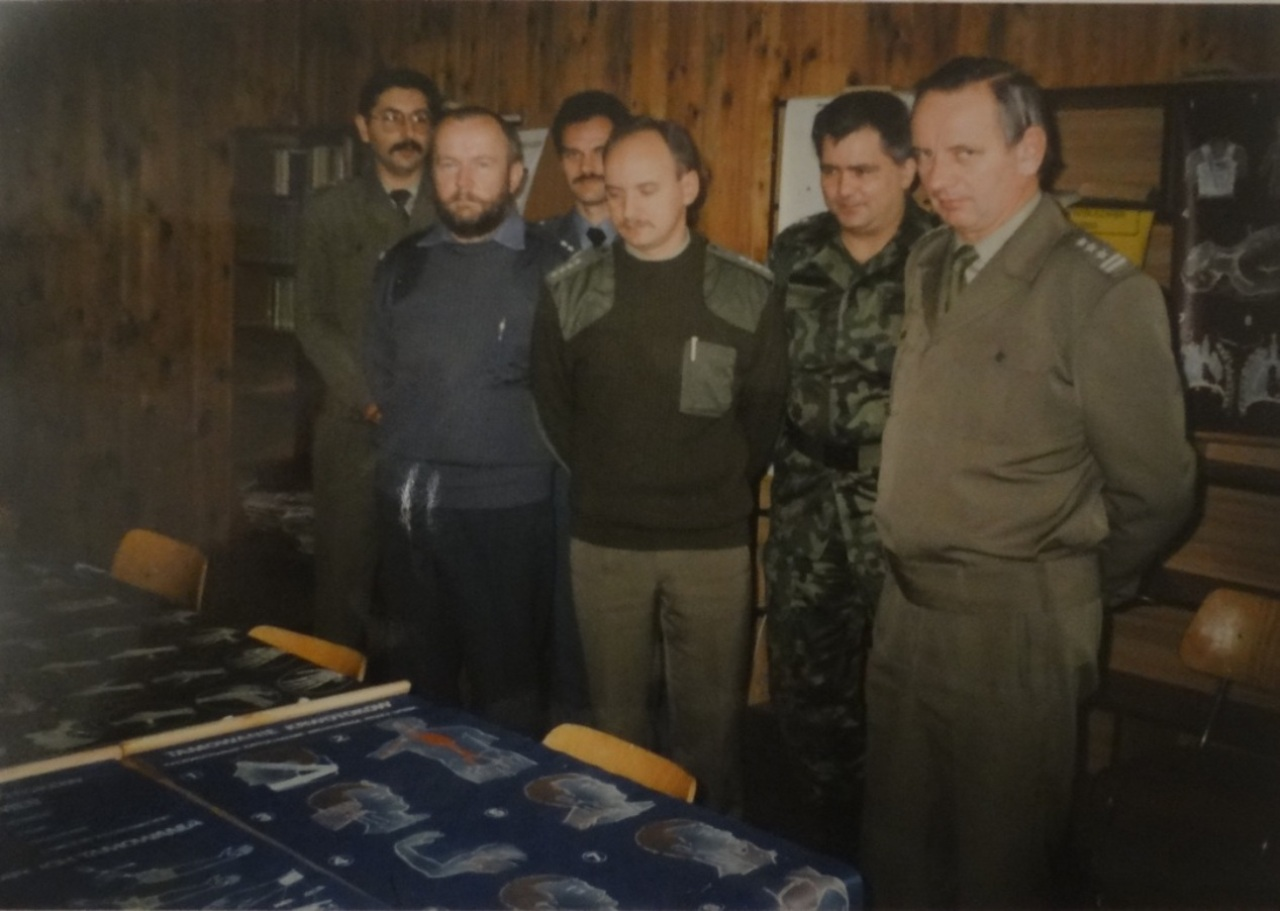 Stargard Szczeciński. Były dowódca 12 Batalionu Medycznego mjr lek. Marcin Borkowski (drugi od prawej) wśród lekarzy garnizonu i Szefa Katedry OOZW WAM płk dr Mariana Dujczyńskiego